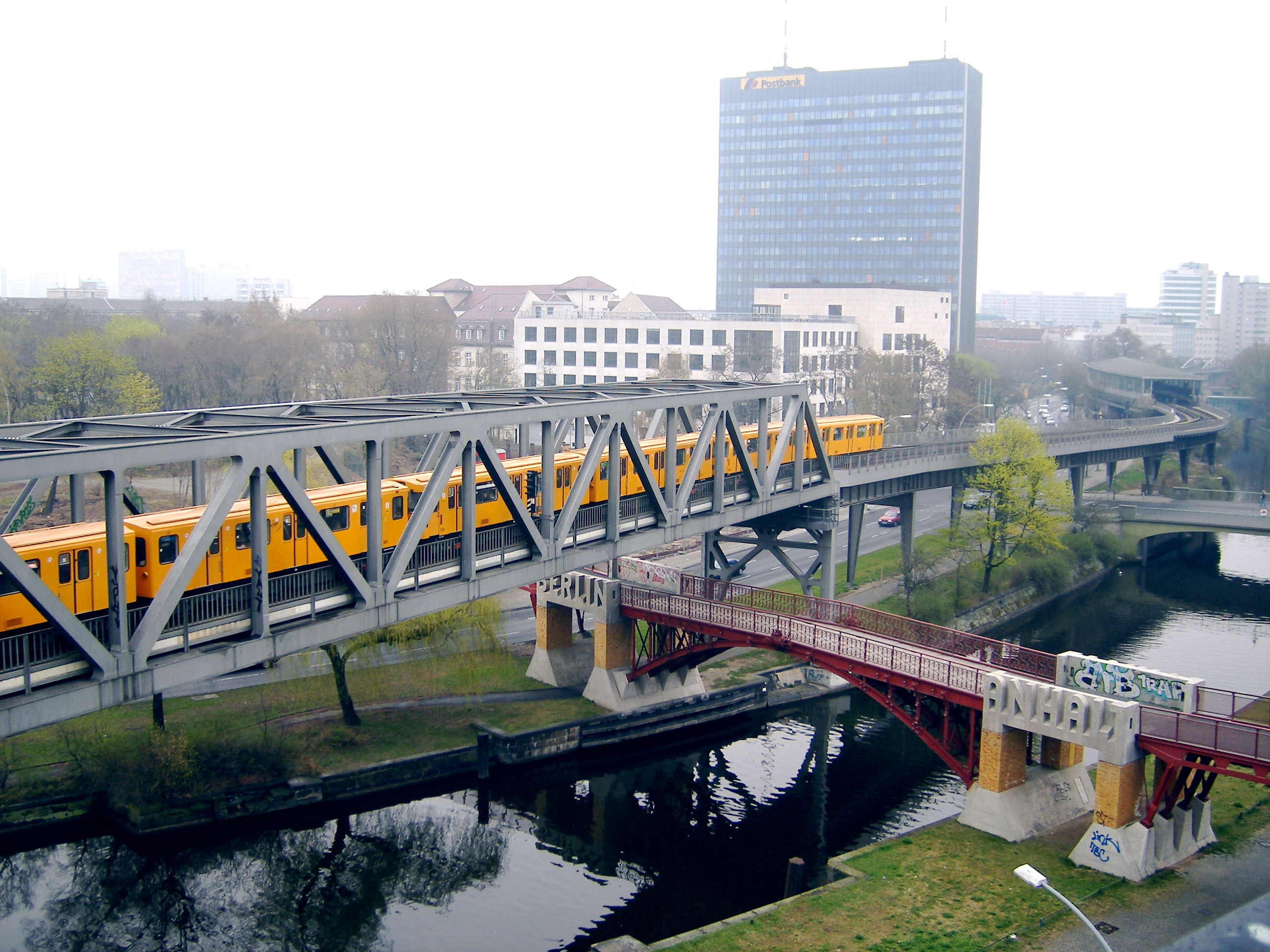 Anhalter Steg in Berlin-Kreuzberg. Coordinates: 52°29'57" N, 13°22'45" E.